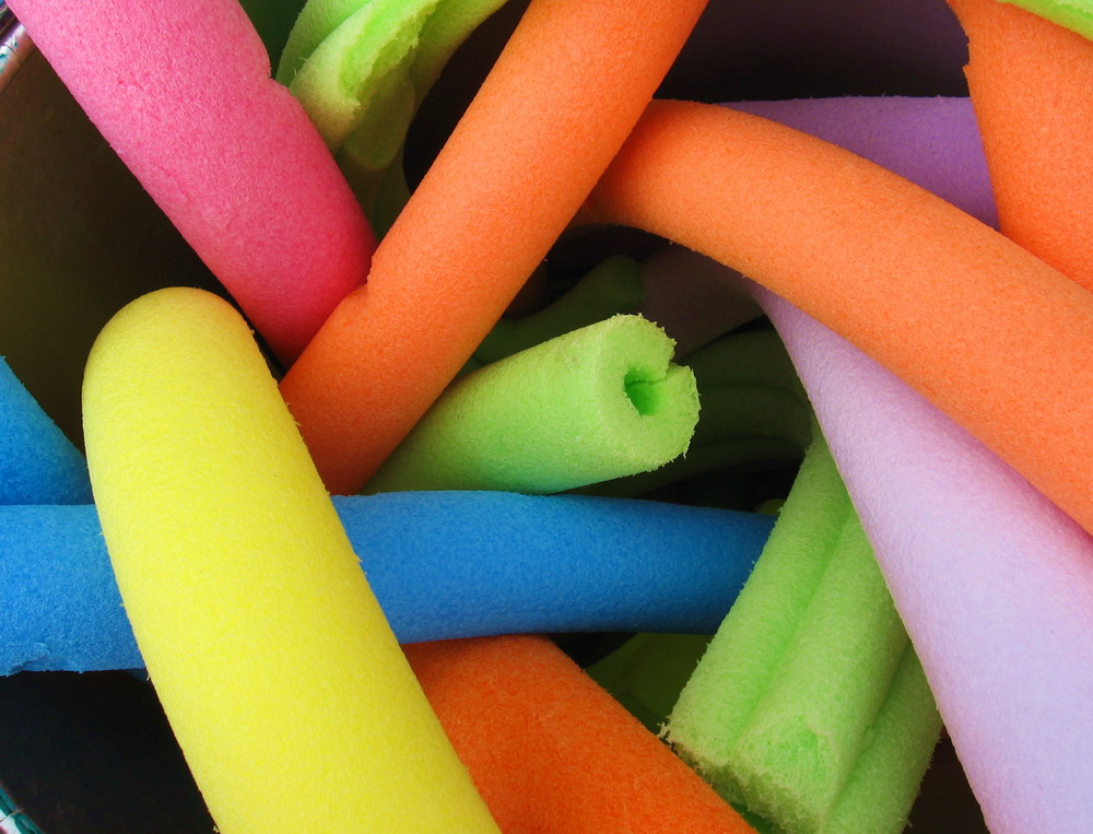 Pool noodles